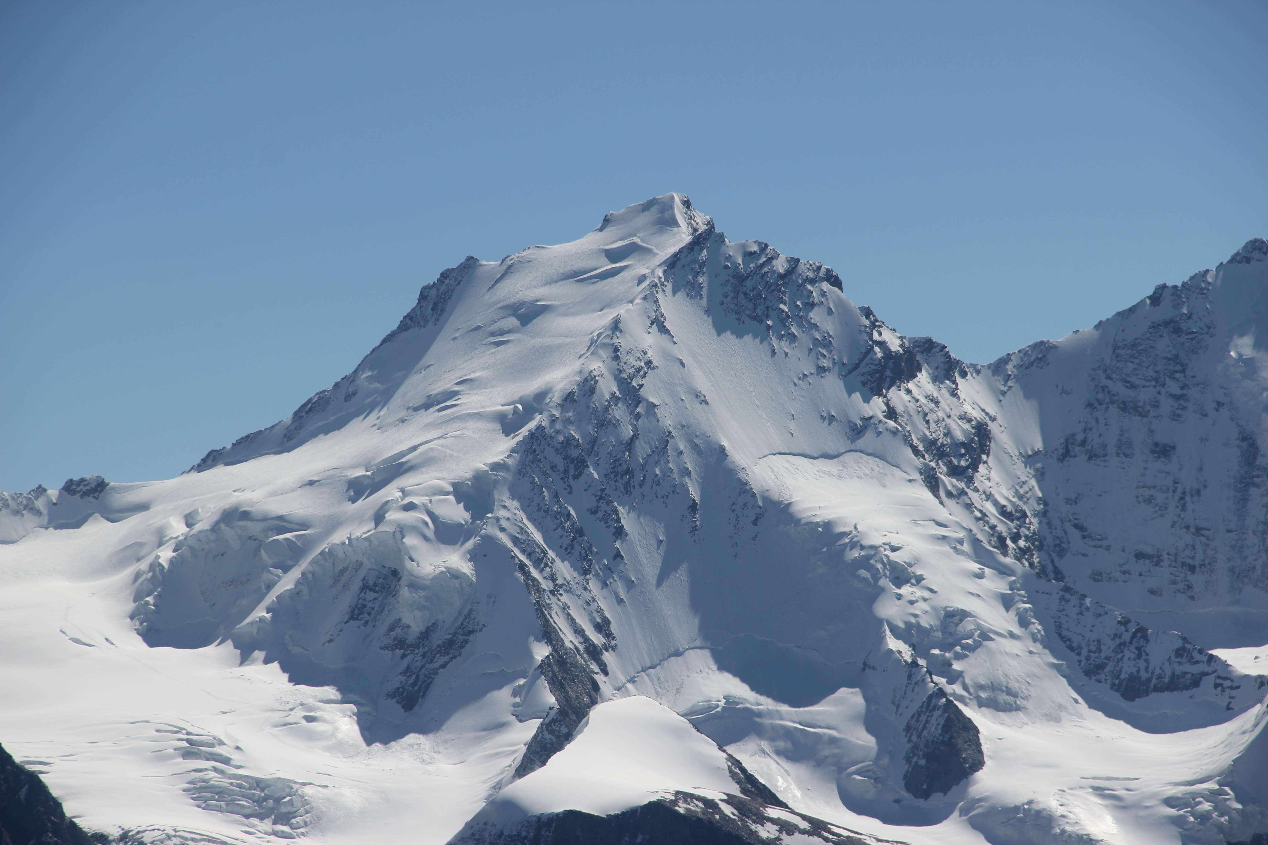 Dom